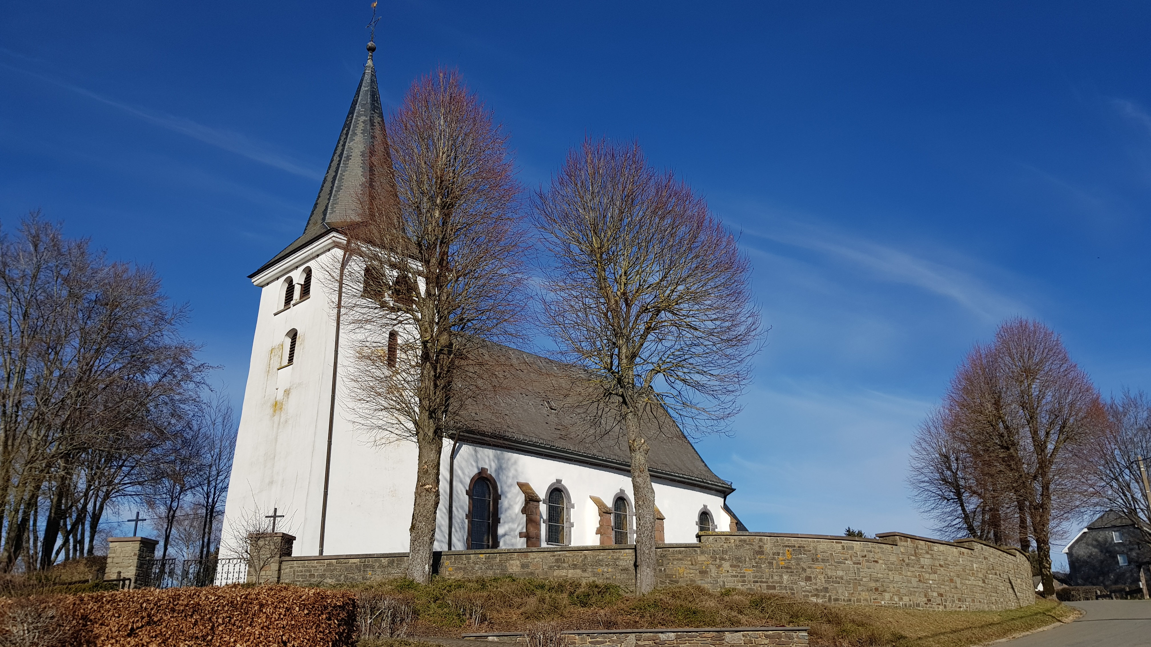 St. Anna Kirche, Wirtzfeld, Belgien